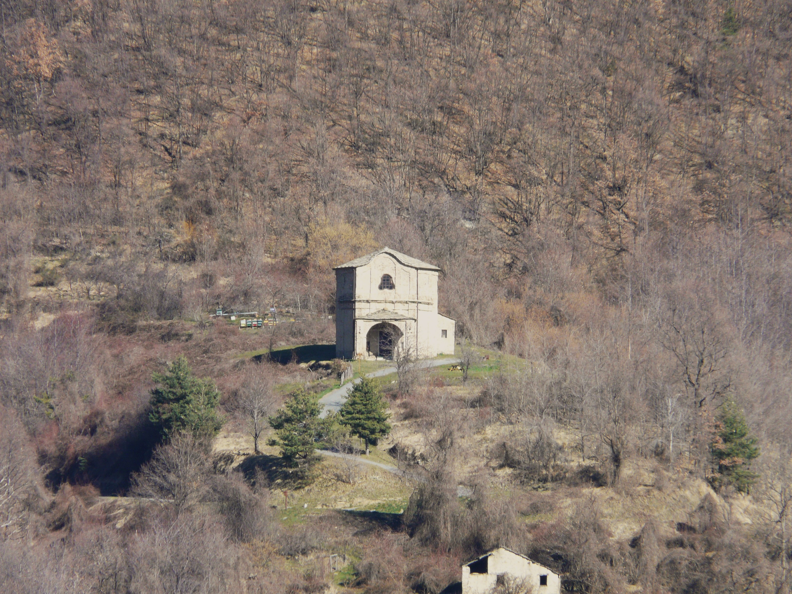 Santuario della Madonna dei Colombi, Mendatica, Liguria, Italia